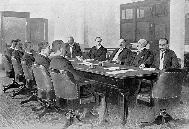 Les plénipotentiaires en séance, le 14 août : "M. Adatchi. M. Otchini. Baron Komura. M. Takahira. M. Sato de Plançon. M. Naboukof. M. Witte, baron de Rosen. M. Korostovetz."